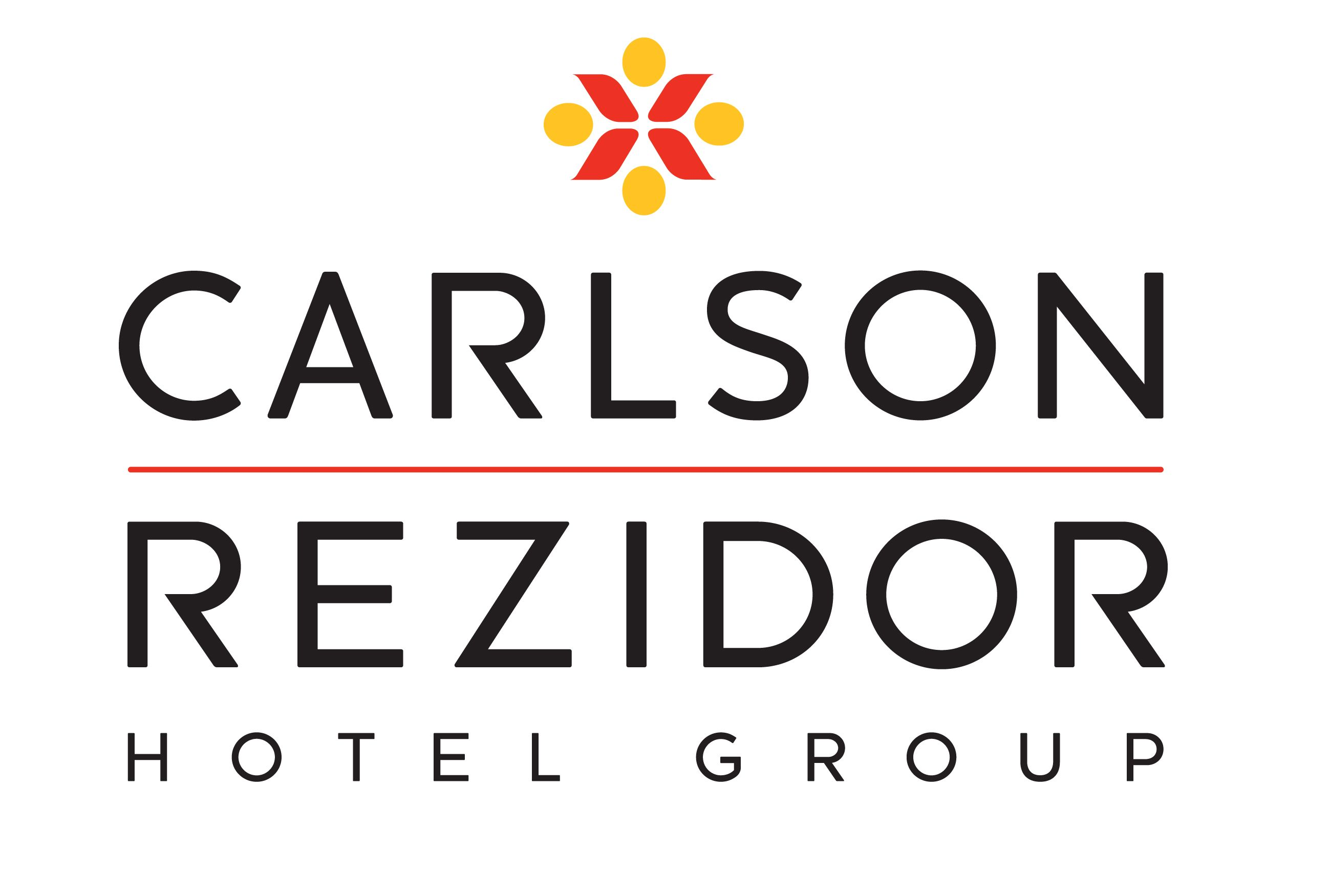 Logo der Carlson Rezidor Hotel Group